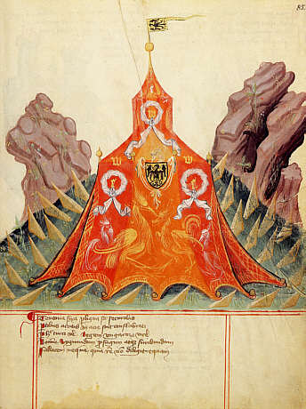 Česky: ilustrace stanu z Bellifortis